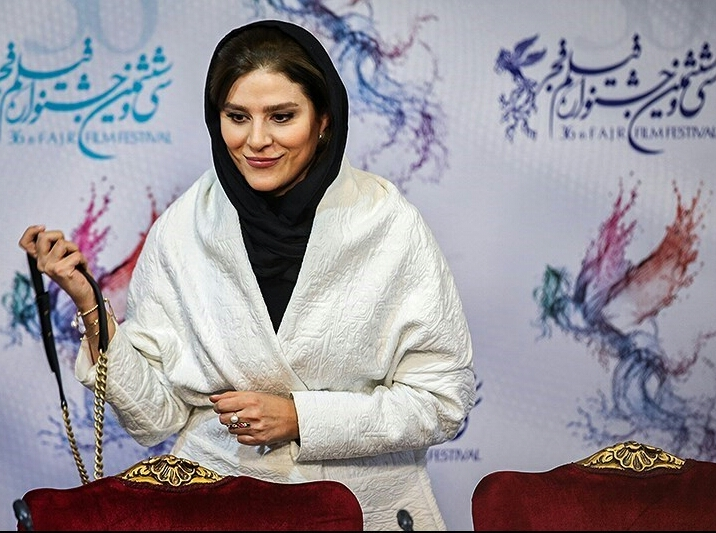 سحر دولتشاهی - جشنواره فیلم فجر ۱۳۹۶